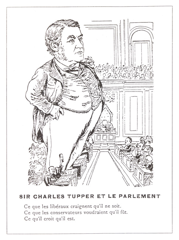 "Sir Charles Tupper et le parlement"